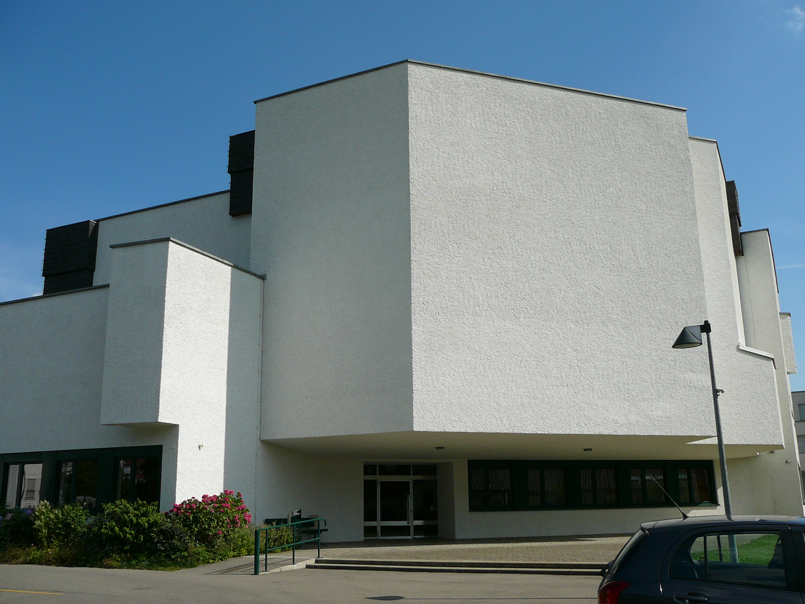 Römisch-katholische Pfarrkirche St. Michael Zollikerberg, Ansicht von Norden